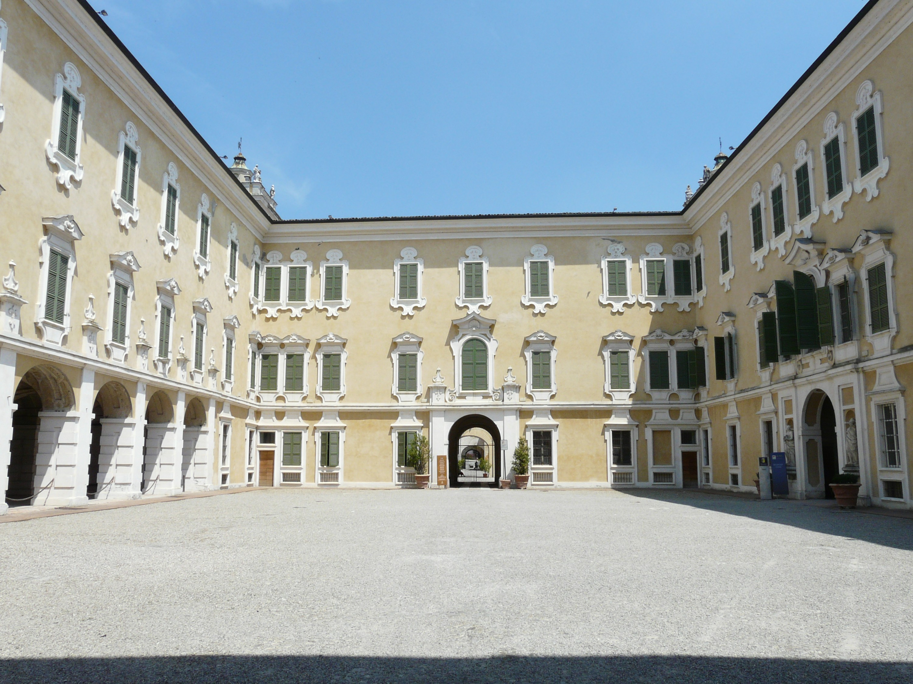 Immagini della Reggia di Colorno, Emilia-Romagna, Italia